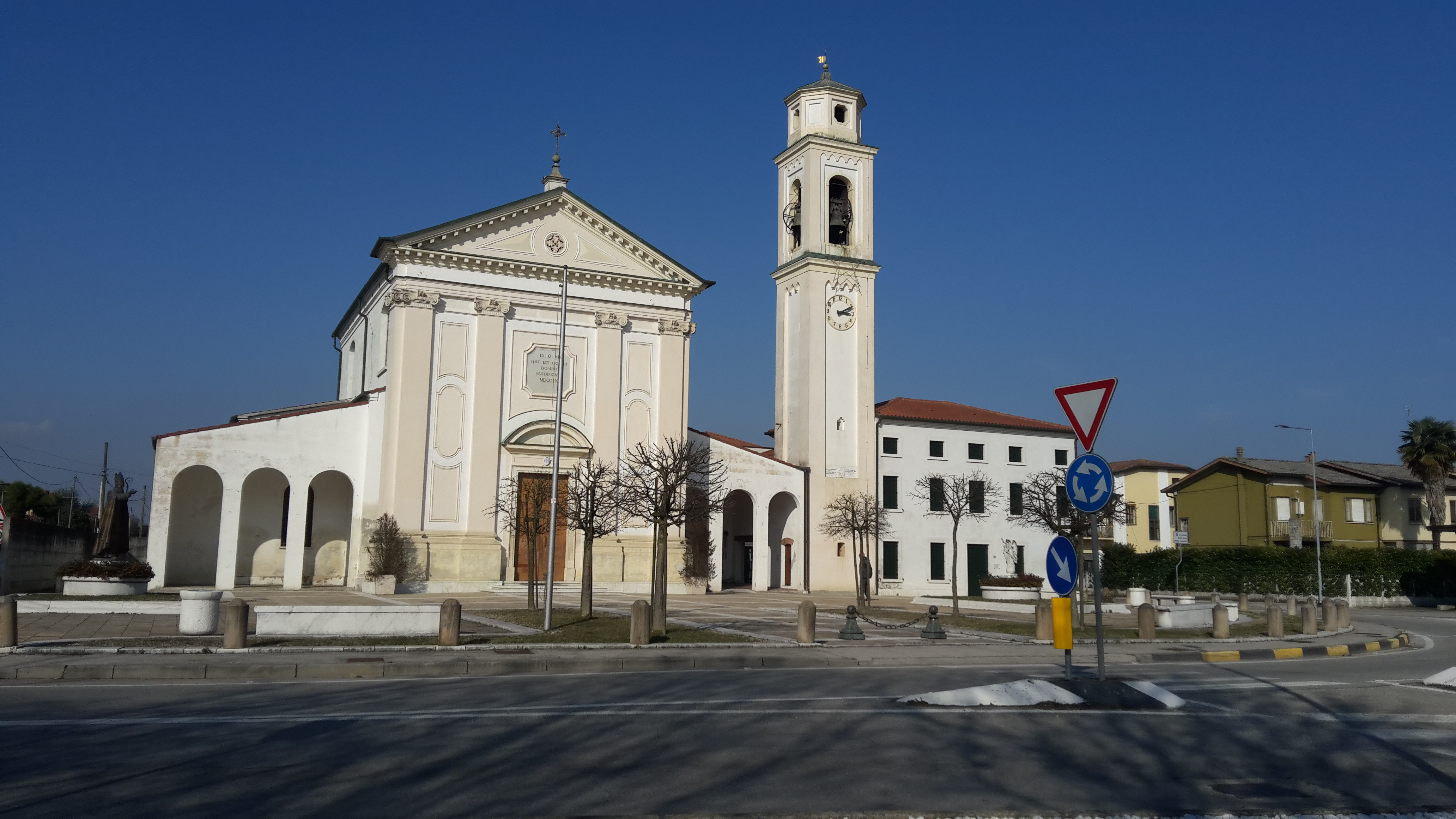 Fiumicello, frazione di Campodarsego: la chiesa parrocchiale di San Nicola situata nel centro del paese.